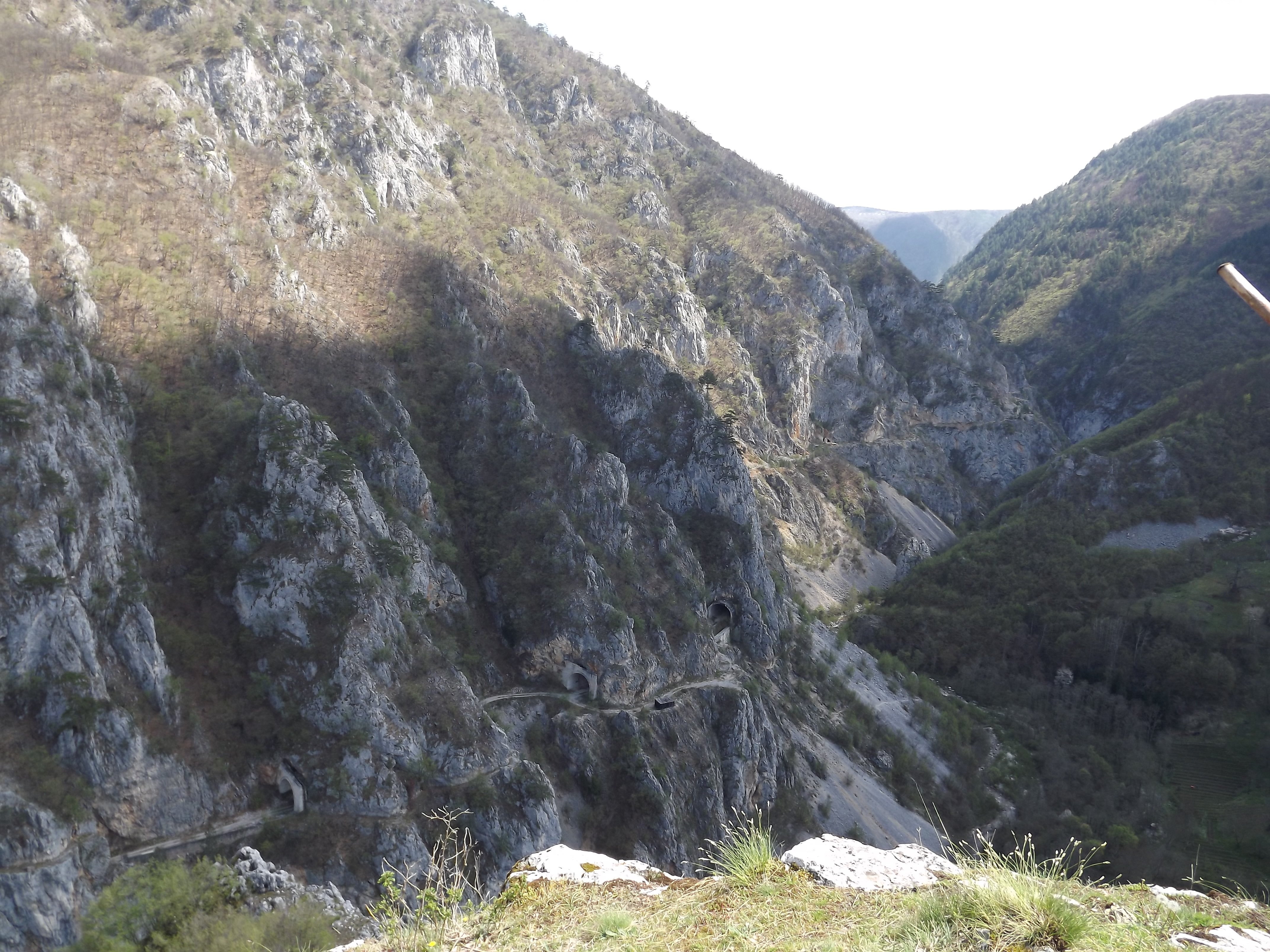 Ово је фотографија заштићеног природног добра у Србији под шифром: РП46This is a a photo of a natural area in Serbia with ID: РП46 Специјални резерват природе Клисура реке Милешевке